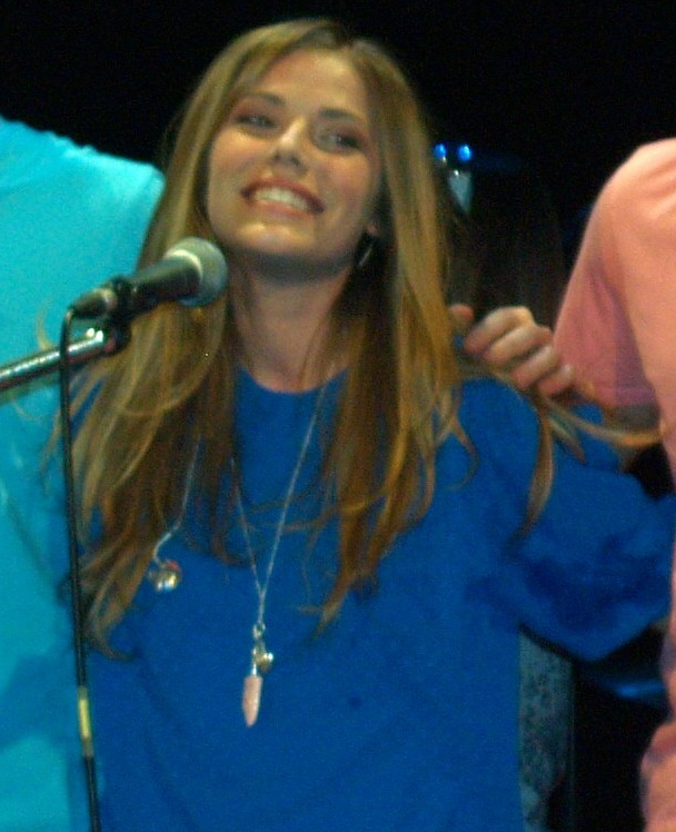 Emma Daumas (based on: File:Emma Daumas et ces musiciens.JPG)